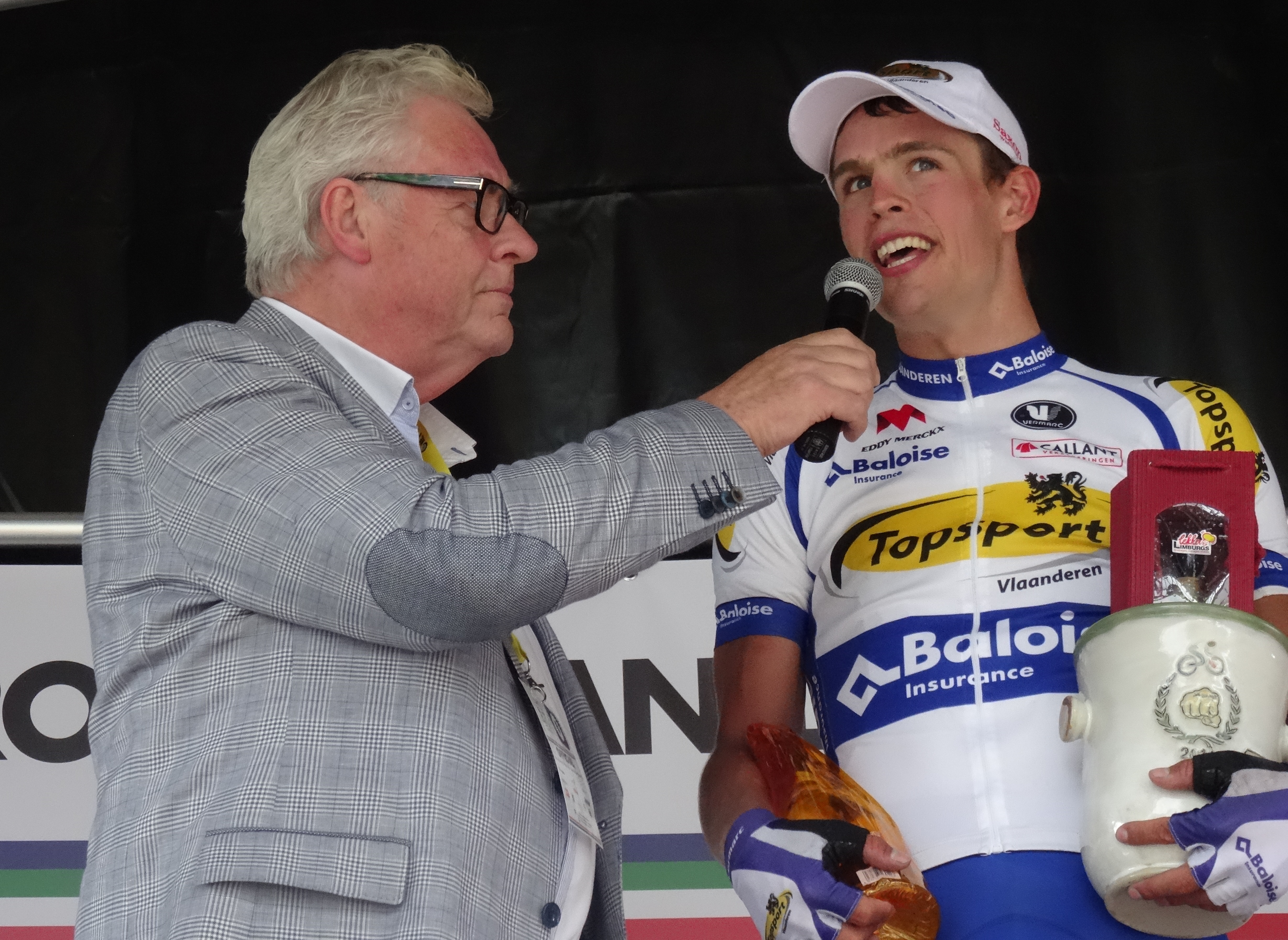 Reportage photographique réalisé le dimanche 15 juin à l'occasion du départ et de l'arrivée du Tour du Limbourg 2014 à Tongres, Belgique.